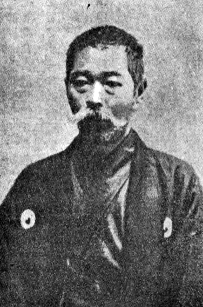 外山脩造（とやま しゅうぞう、1842年11月10日 - 1916年1月13日）肖像。慶應義塾卒業。大蔵省、日本銀行大阪支店長等を経て、アサヒビール、阪神電鉄、商業興信所（日本初の信用調査会社）の創業に関わる。衆議院議員。阪神電気鉄道社長。